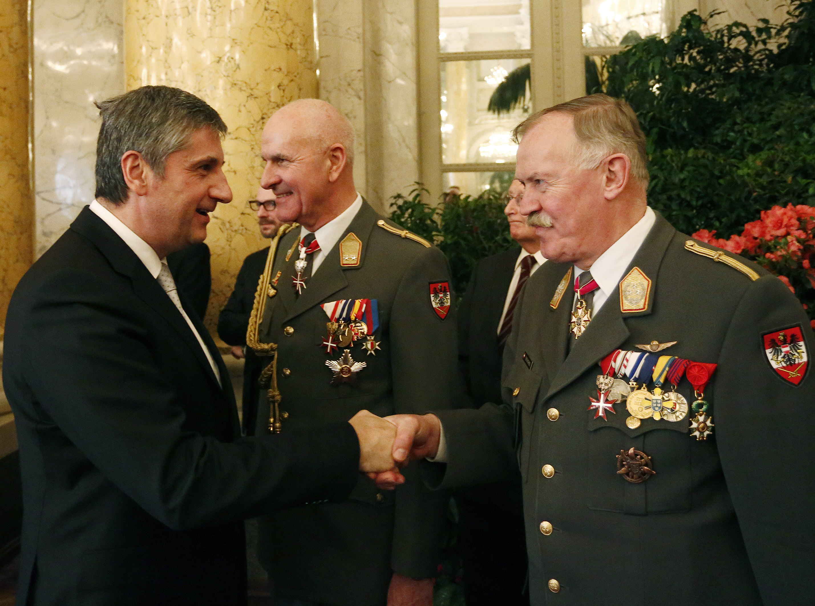 Neujahrsempfang für das Diplomatische Corps in der Hofburg, Vizekanzler Michael Spindelegger im Gespräch mit dem Generalstabschef des Bundesheeres Edmund Entacher. Wien, 15.01.2013, Foto: Dragan Tatic